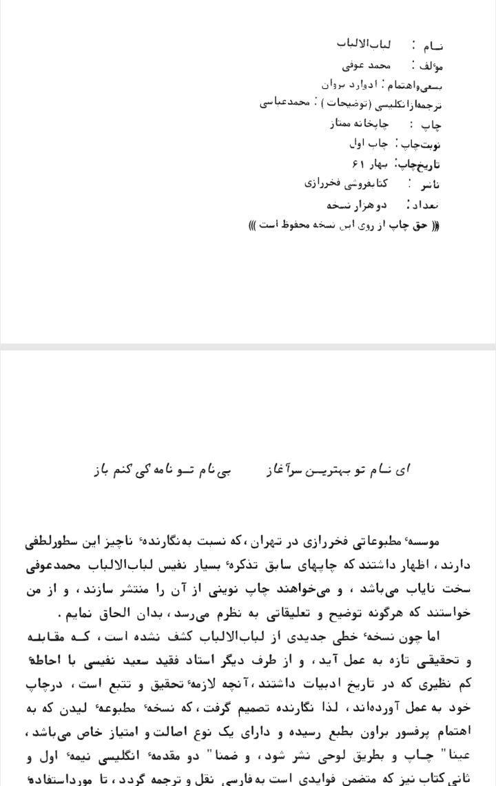 مقدمه کتاب لباب الالباب - انشارات فخر رازی - بهار 61